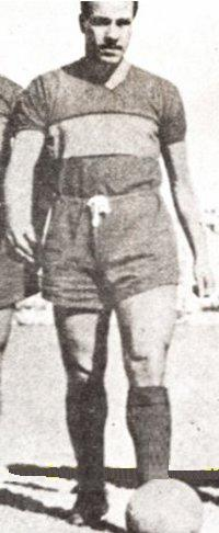 José Manuel Moreno, el "Charro", vistiendo la Camiseta de Boca Juniors.